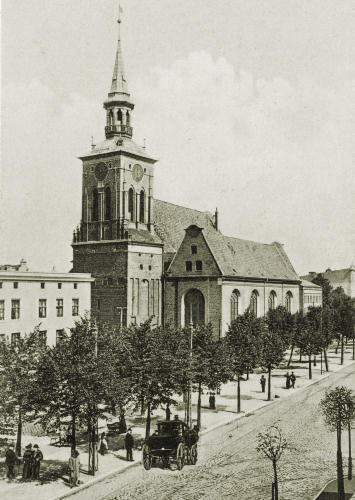 Gdańsk Długie Ogrody - dawny kościół szpitalny, obecnie rzymskokatolicki kościół parafialny p.w. św. Barbary w Gdańsku, 1387, XV, 1968-1970.